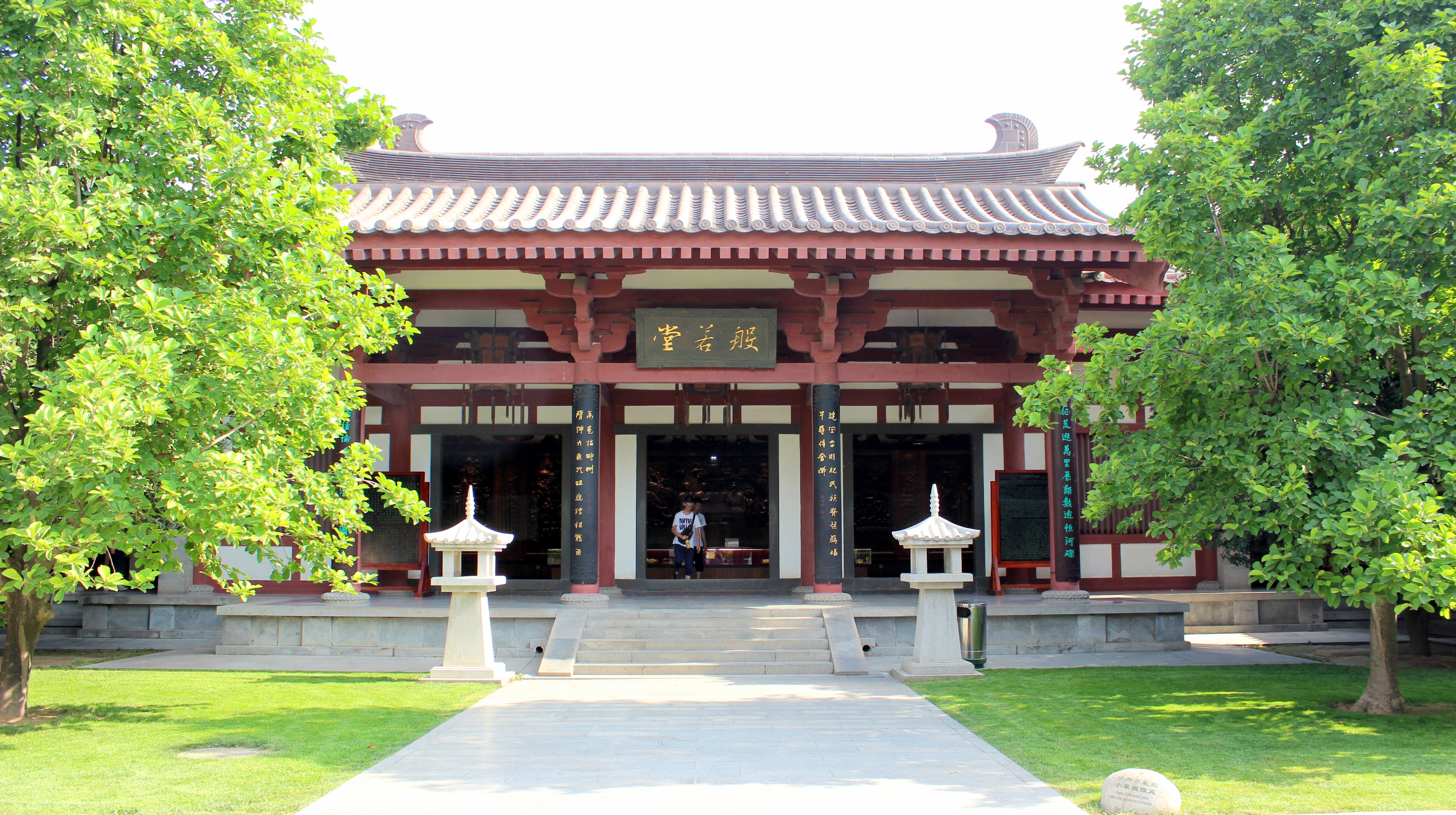 Daci'en Temple, Xi'an, China